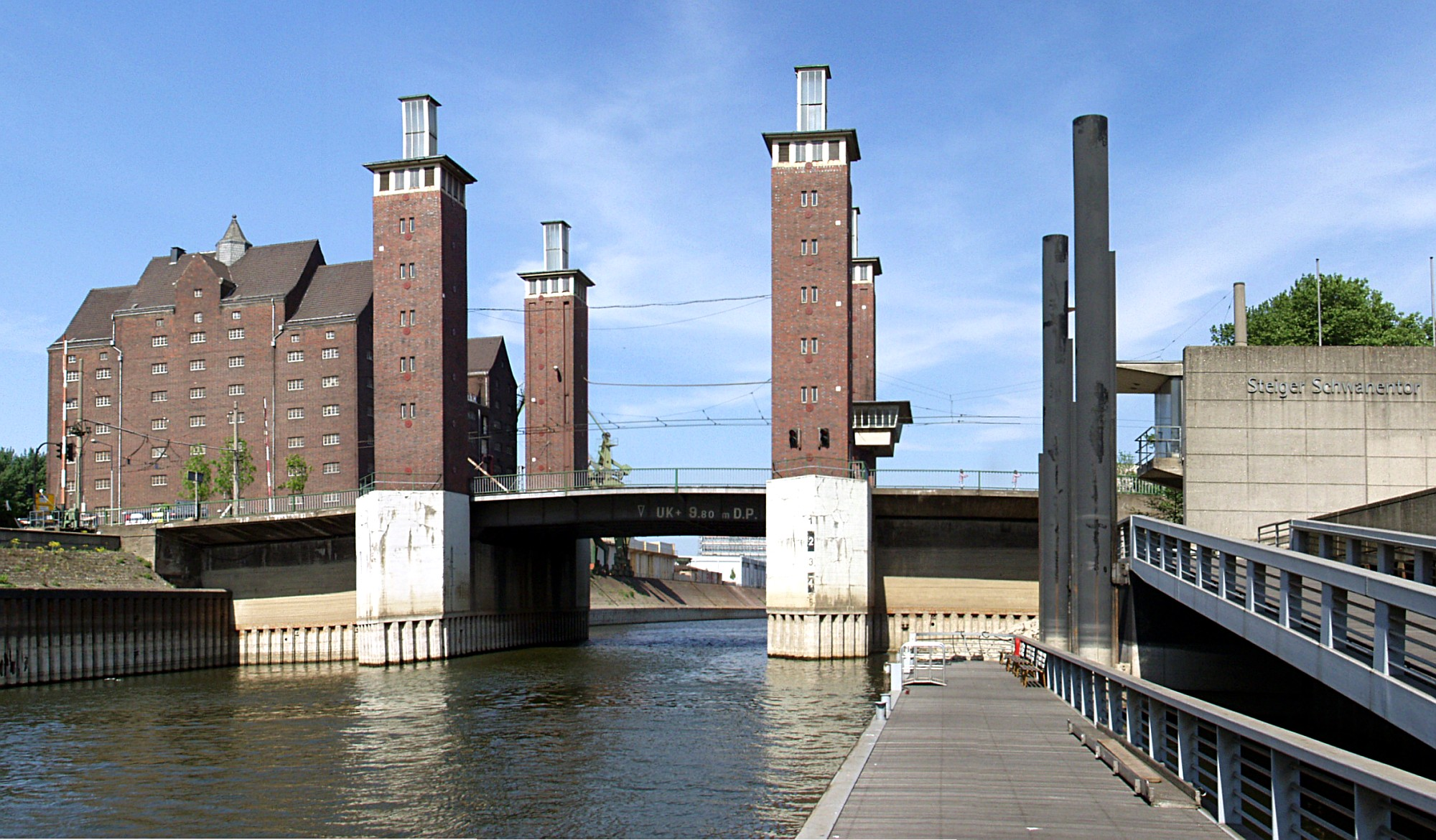 Schwanentorbrücke, Duisburg. Links im Hintergrund der ehemalige RWSG Speicher This is a photograph of an architectural monument.